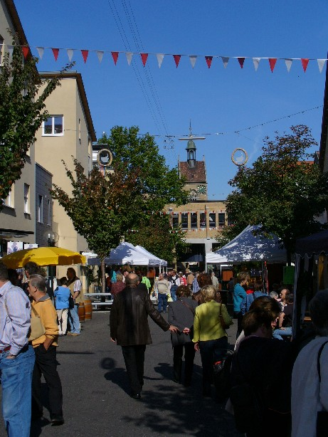 Fellbacher Herbst 9.10.2005 Selbst fotografiert von user:Enslin am 9.10.2005